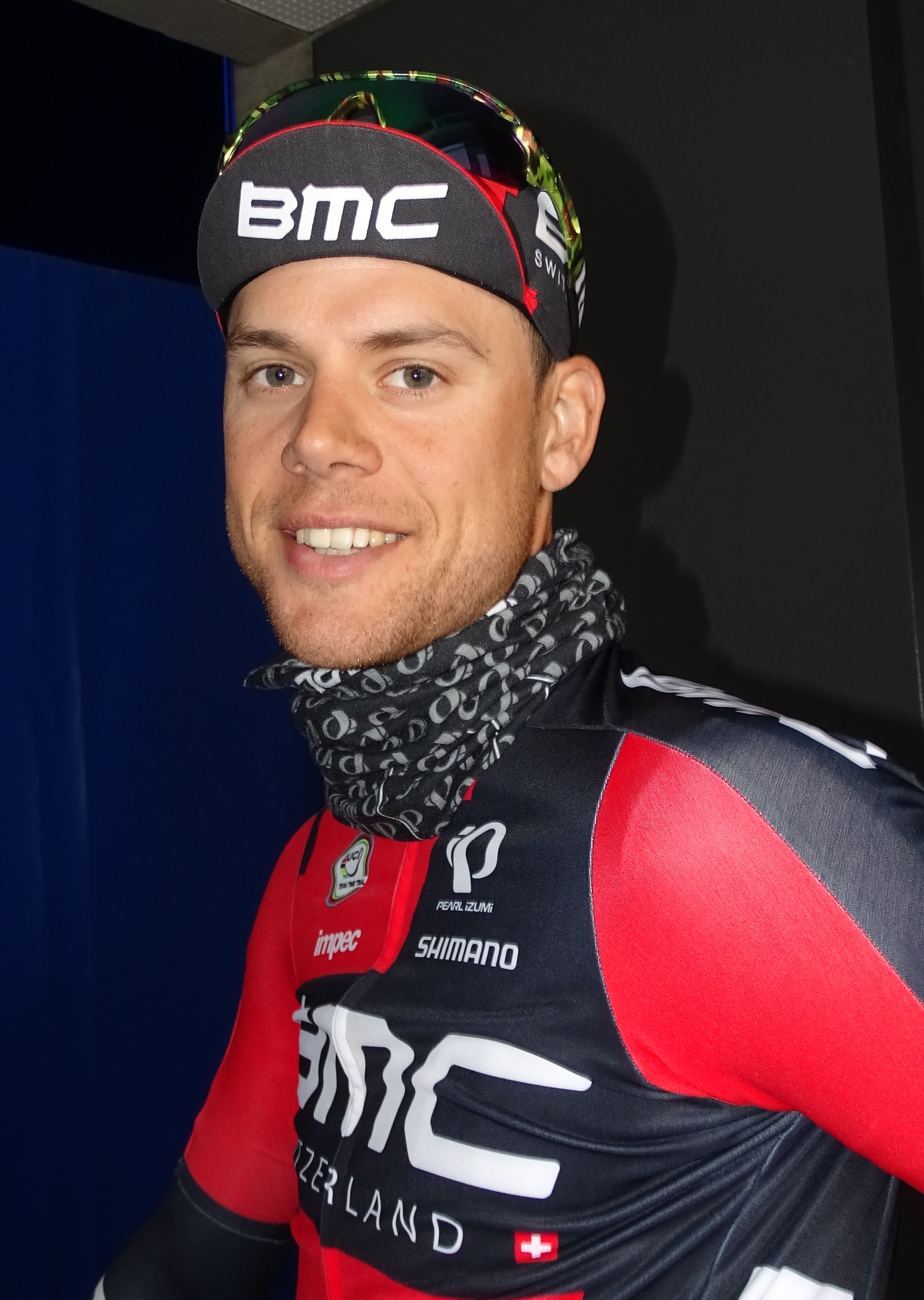 Reportage réalisé le vendredi 20 mars à l'occasion du départ de la Handzame Classic 2015 à Bredene, Belgique.